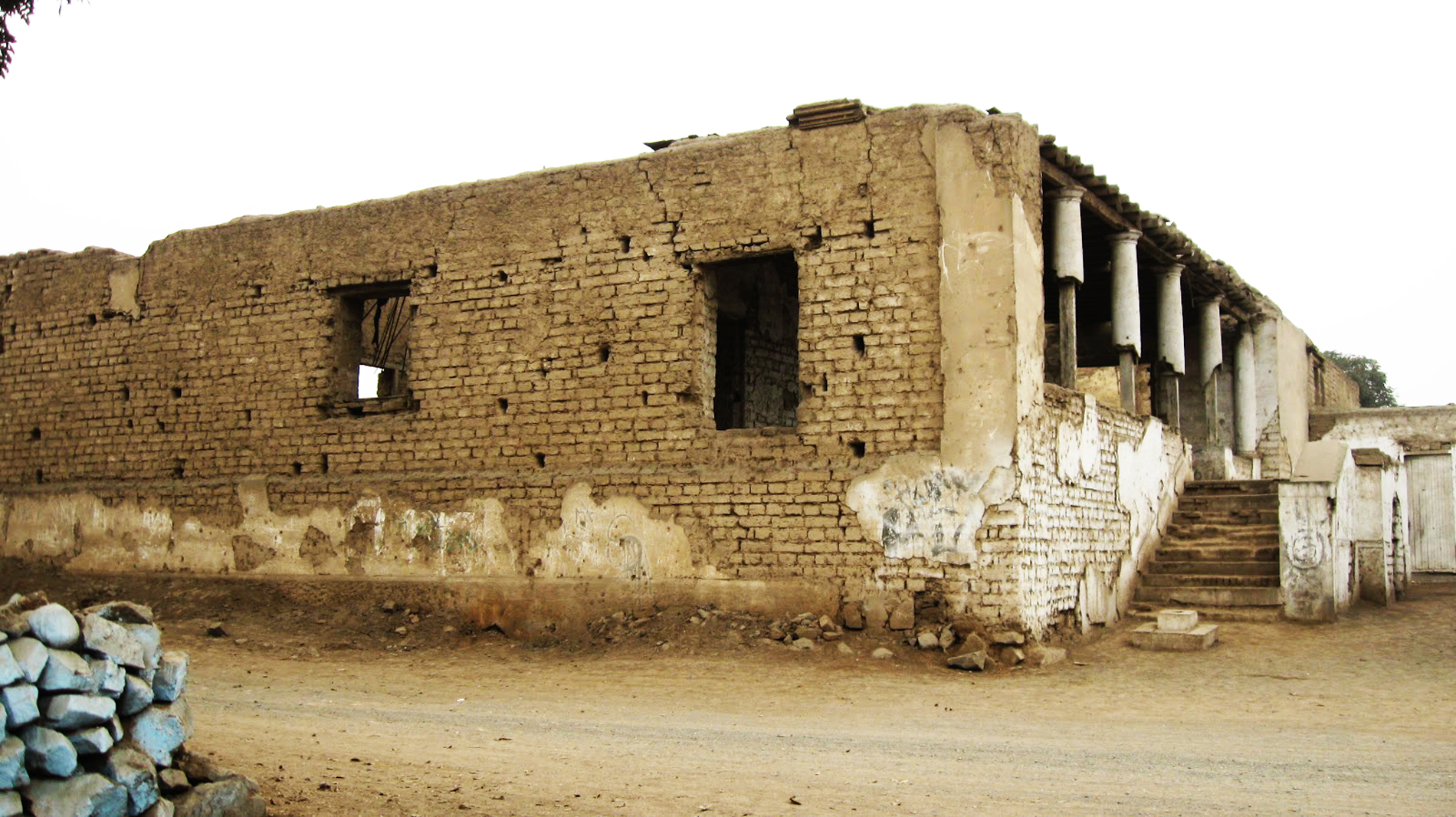 En esta Casona se entrevistaron José San Martín y el último virrey del Perú, José de la Serna.